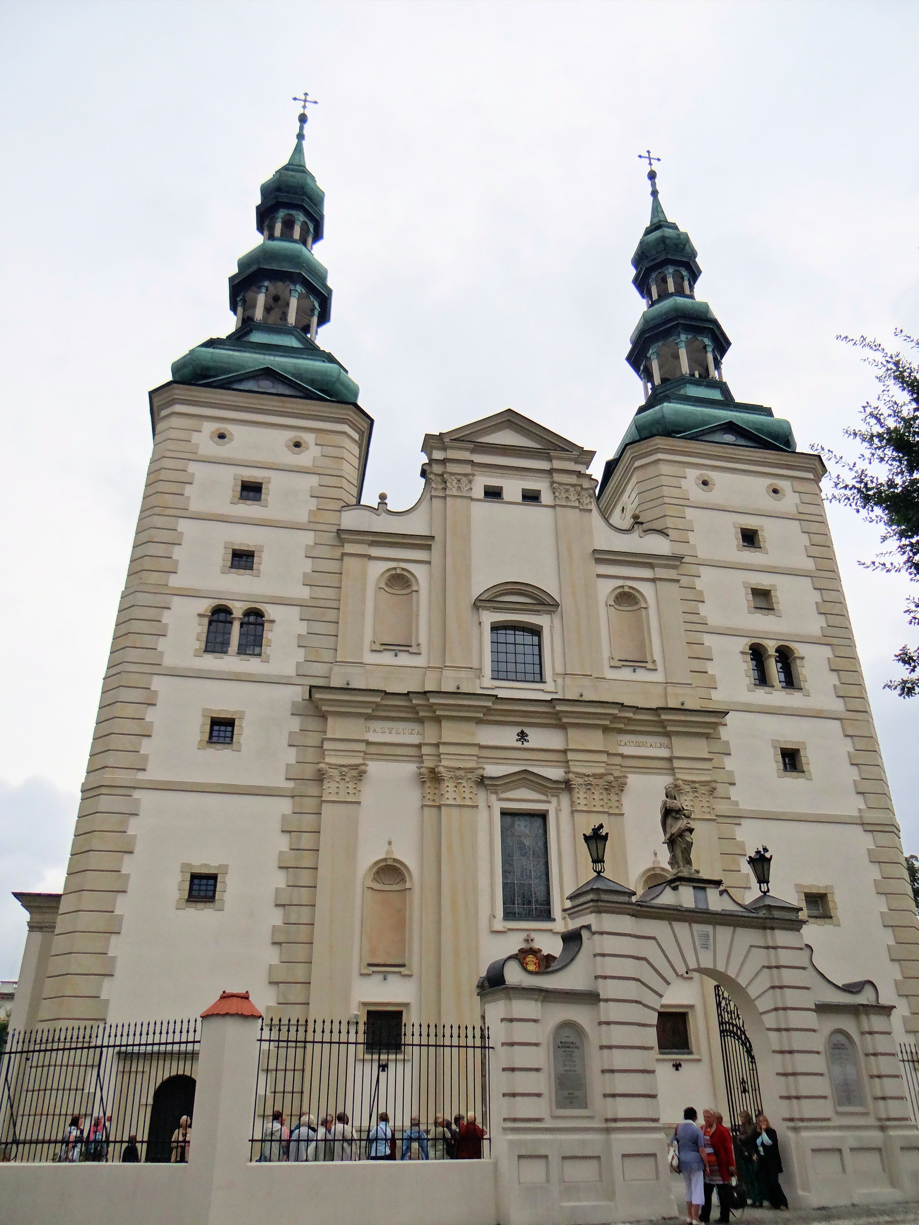 Bazylika Katedralna w Łowiczu - widok od strony zachodniej, od strony ul. Podrzecznej na bramę główną. Brama główna, zbudowana w 1907r, znajduje się na wprost portalu kościoła.